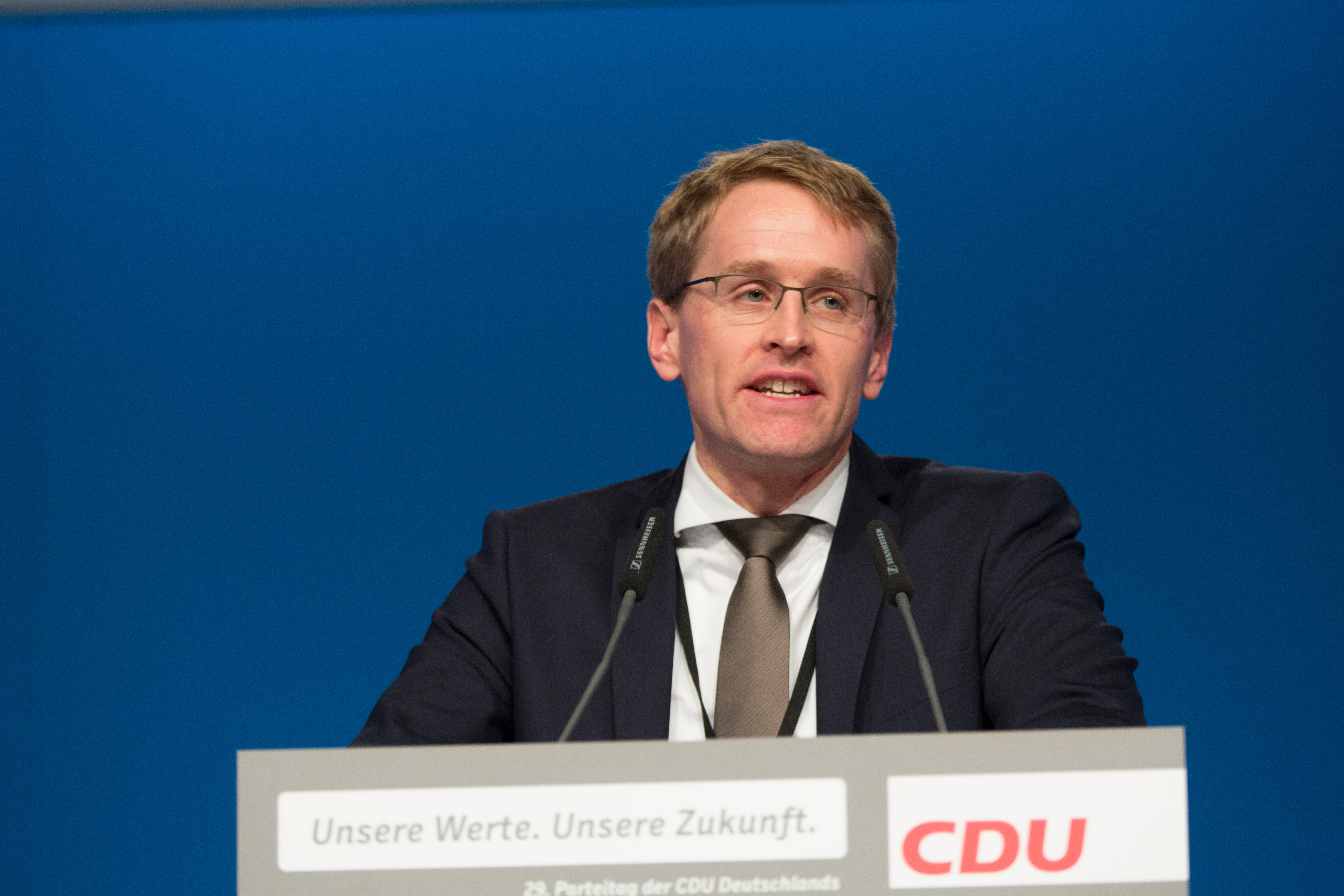 Daniel Günther, Vorsitzender der CDU Landtagsfraktion SchleswigHolstein auf dem 29. Parteitag der CDU Deutschlands am 6. Dezember 2016 in Essen, Grugahalle